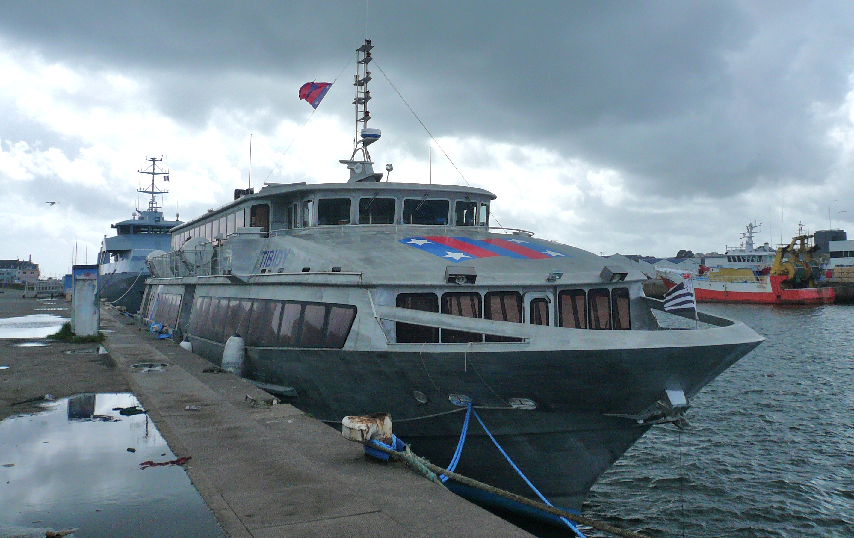 Le navire de transport de passagers Tibidy de la ligne Morlenn Express (Société Morbihanaise de Navigation - SMN), à quai dans le port de Concarneau, Finistère, Bretagne, France.